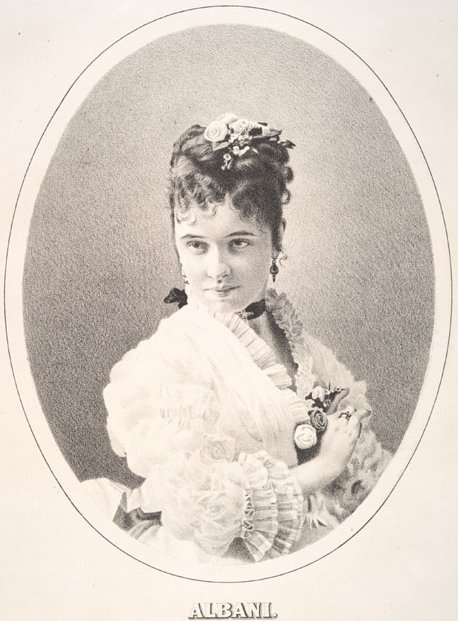 Emma Albani, circa 1870